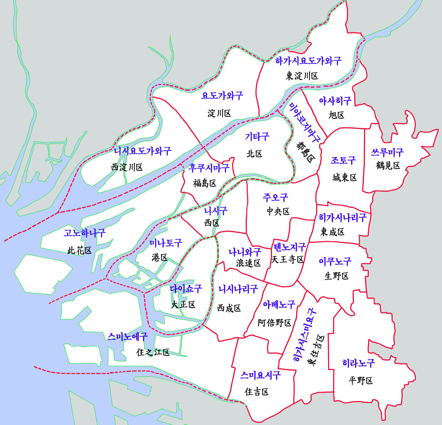 오사카시 행정구역